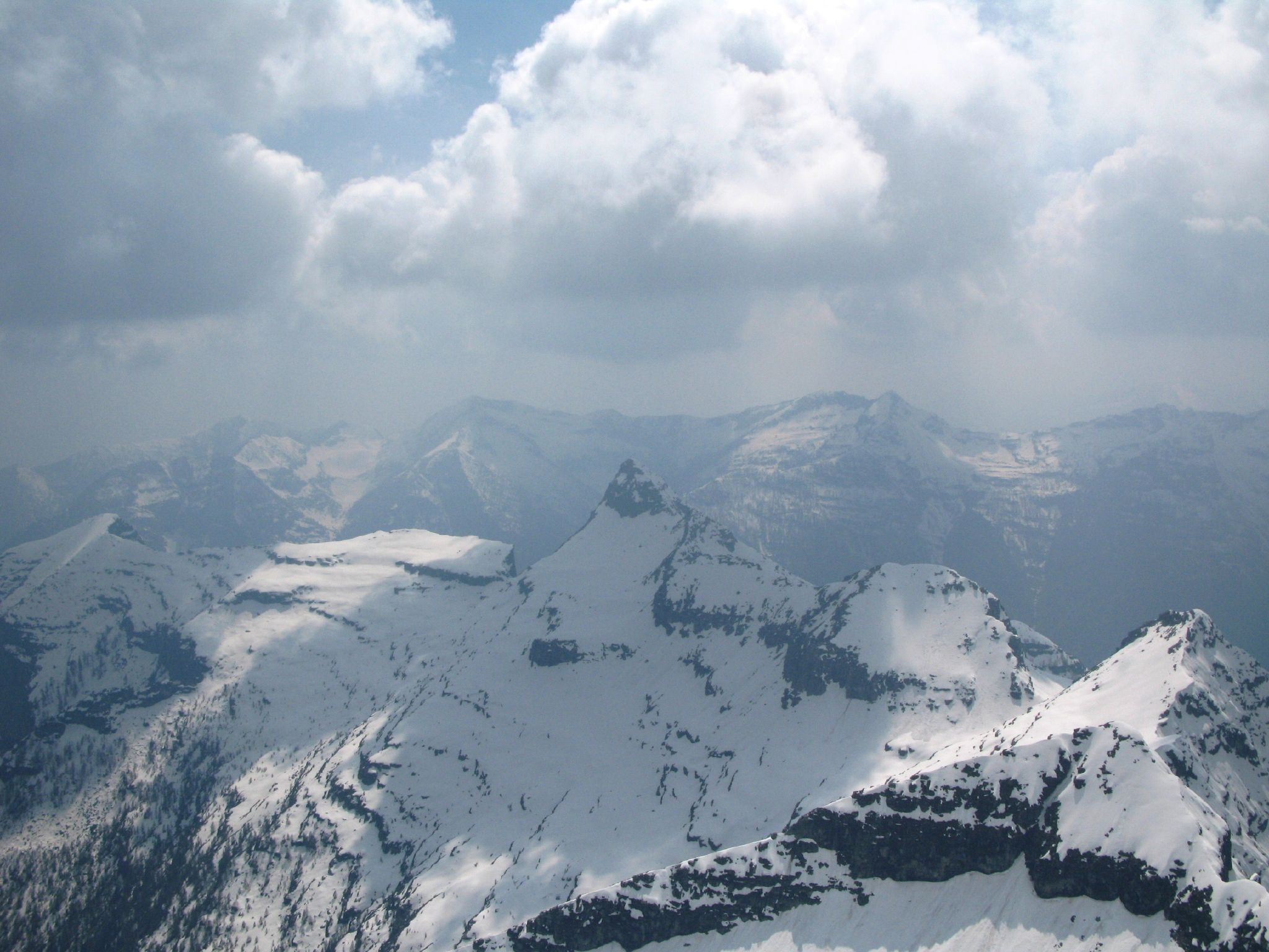 Foto della Cima di Gagnone (al centro)